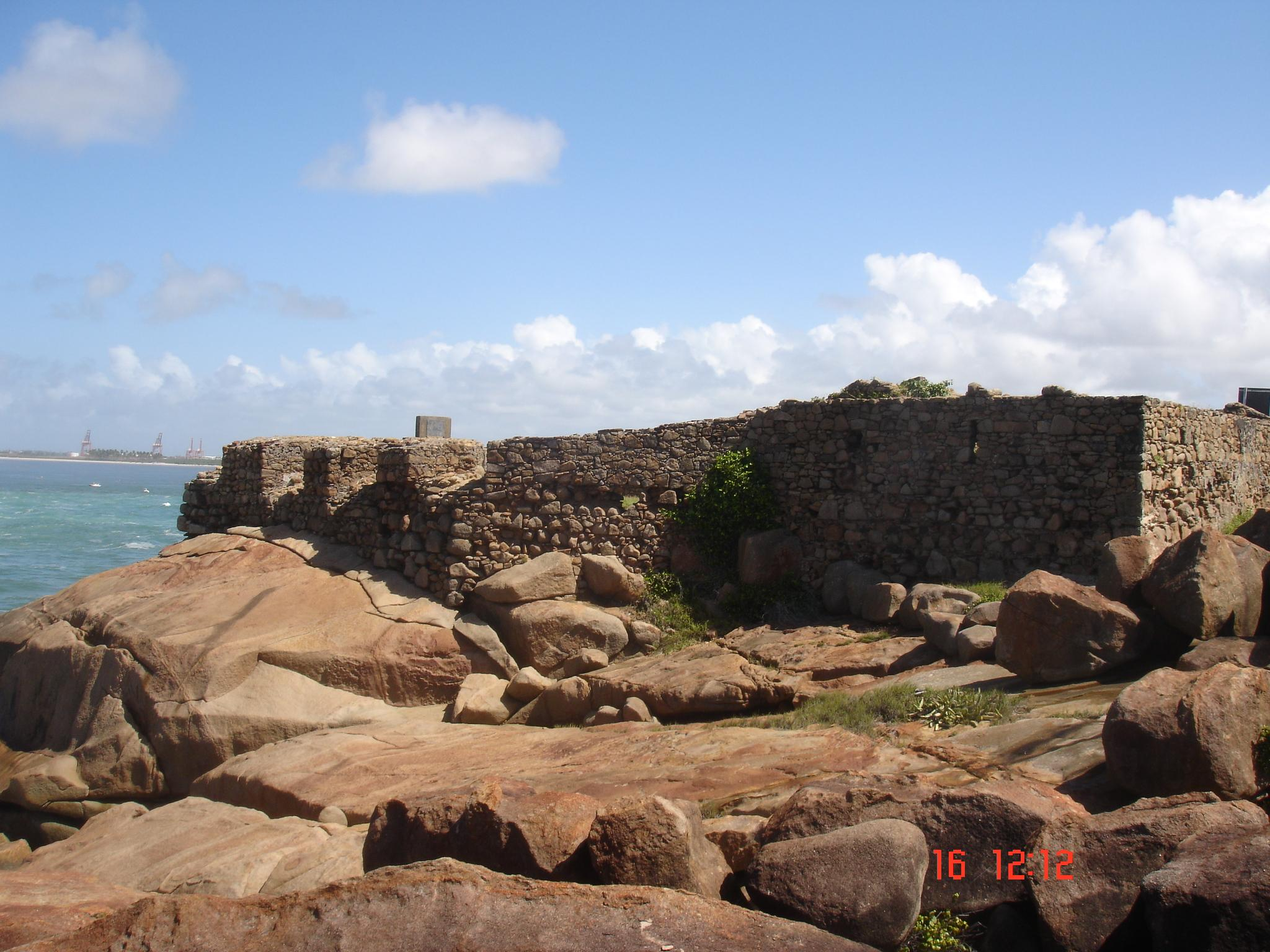 Forte Castelo do Mar. Construido pelo arquiteto militar Sanfelice,o Conde Bagnulo em 1630 e pelos lusos-brasileiros. Apos a invasão dos holandeses deram-lhe o nome de Walter Kastell(Castelo do Mar). Considerada a edificação militar mais importante no litoral de Pernambuco, tinha o objetivo de defender a entrada da barra do Porto de Nazaré e o estuário dos Rios Ipojuca e Massangana. Possuía Três baterias com cinco peças de bronze, totalizando quinze canhões